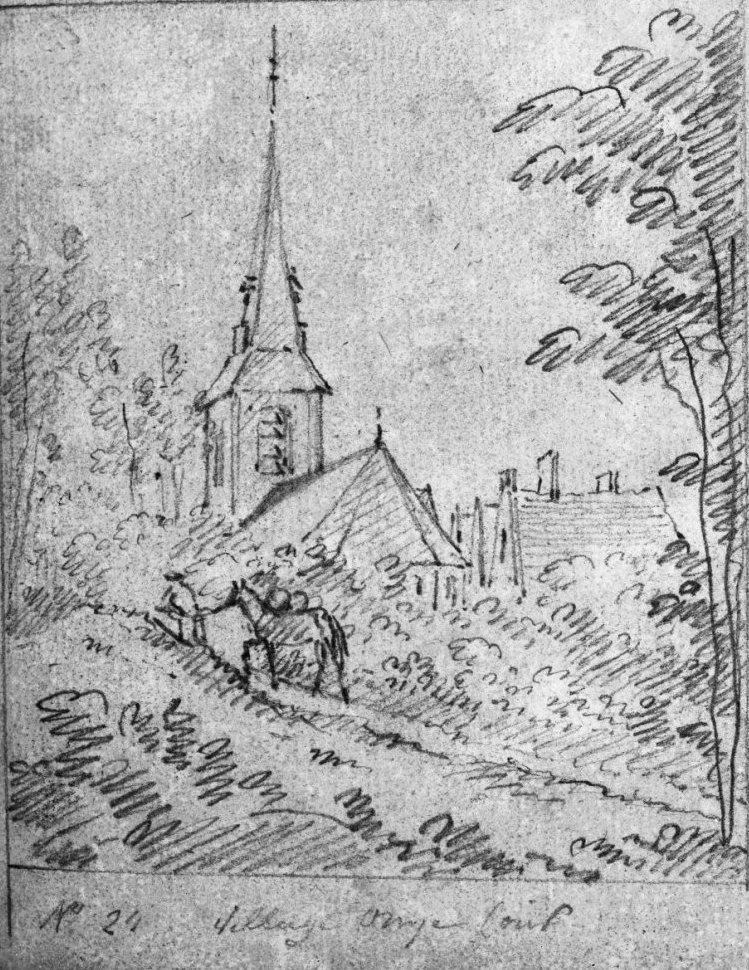 Diversen: tekening, gezicht op de kerk, reproduktie uit schetsboek Dirk Verrijk